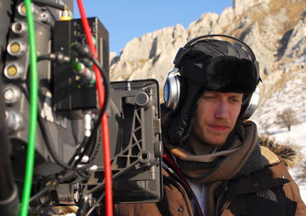 Nemes Jeles László rendező és forgatókönyvíró a The Counterpart című filmje forgatásán.